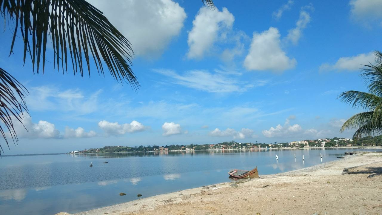 Esta é uma imagem retirada da orla da Praia de Iguabinha. Iguabinha é um distrito pertencente ao município de Araruama - RJ.